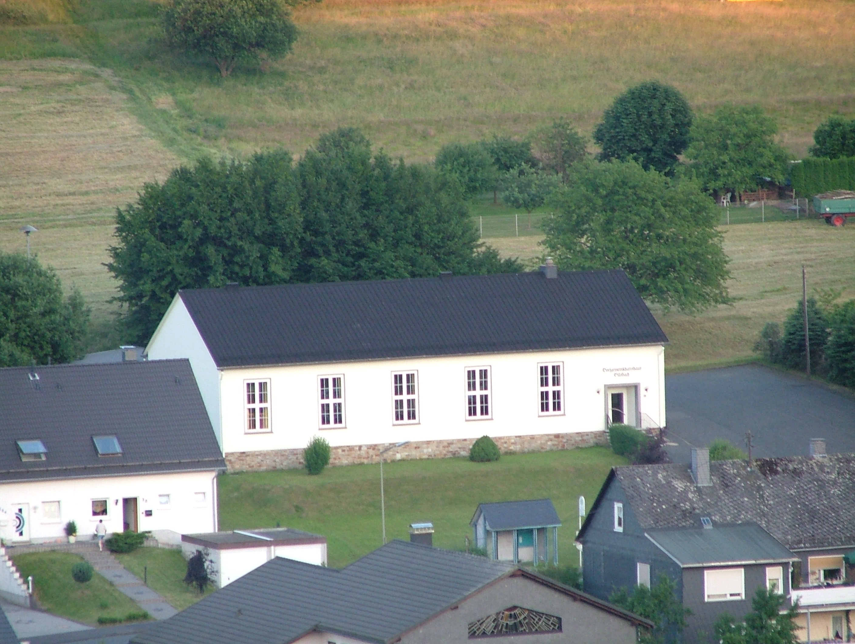 Burbach, Ortsteil Gilsbach, Dorfgemeinschaftshaus